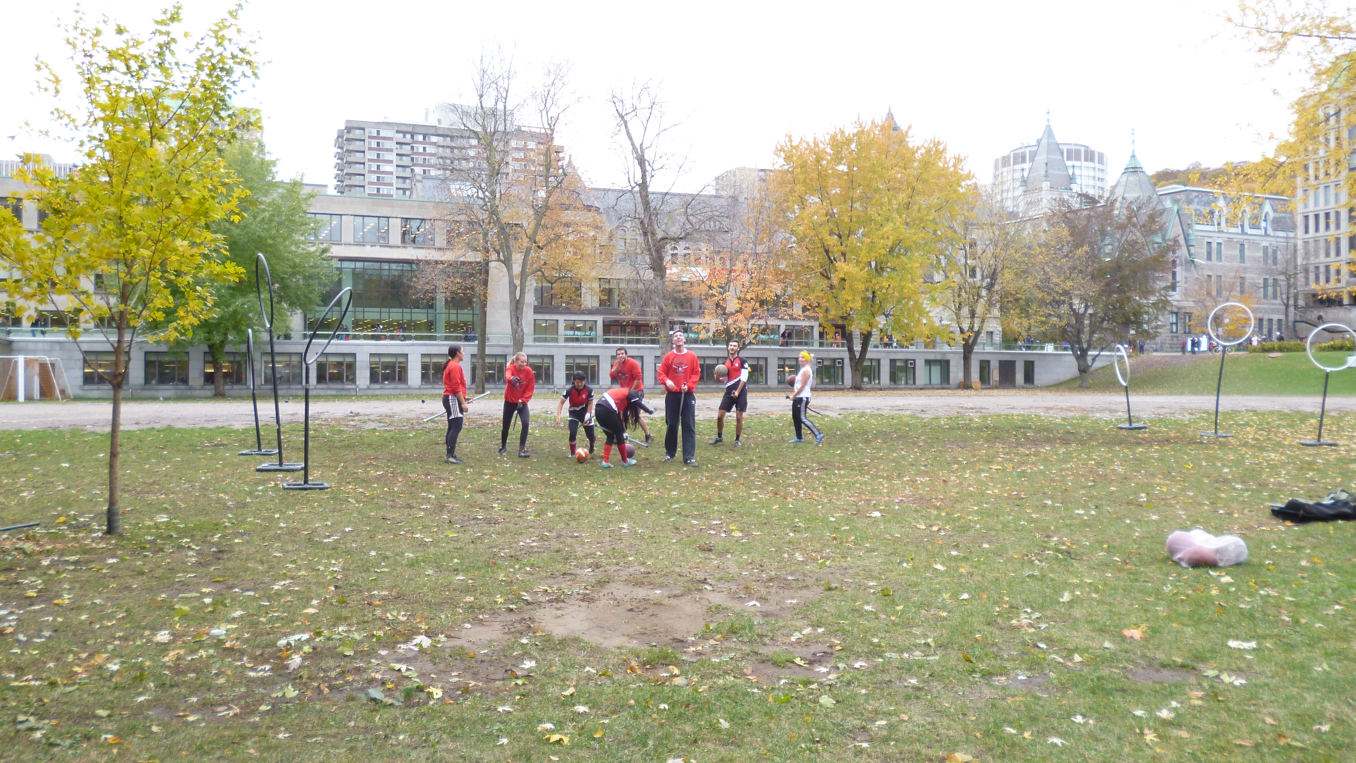 Un match de quidditch à l'université McGill de Montréal (Canada).